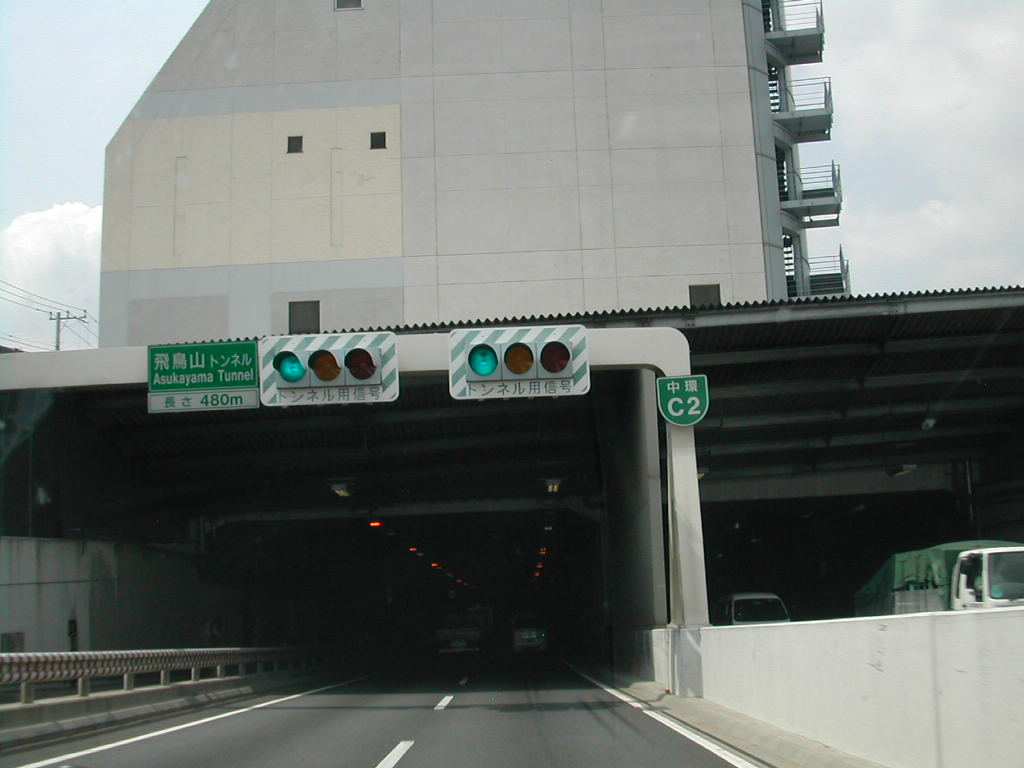 Asukayama Tunnel, Kita, Tokyo, Japan